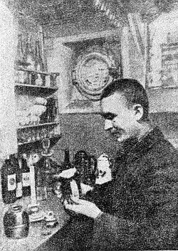 Буфет в кают-компании. Сидит Н. Кизино, буфетчик